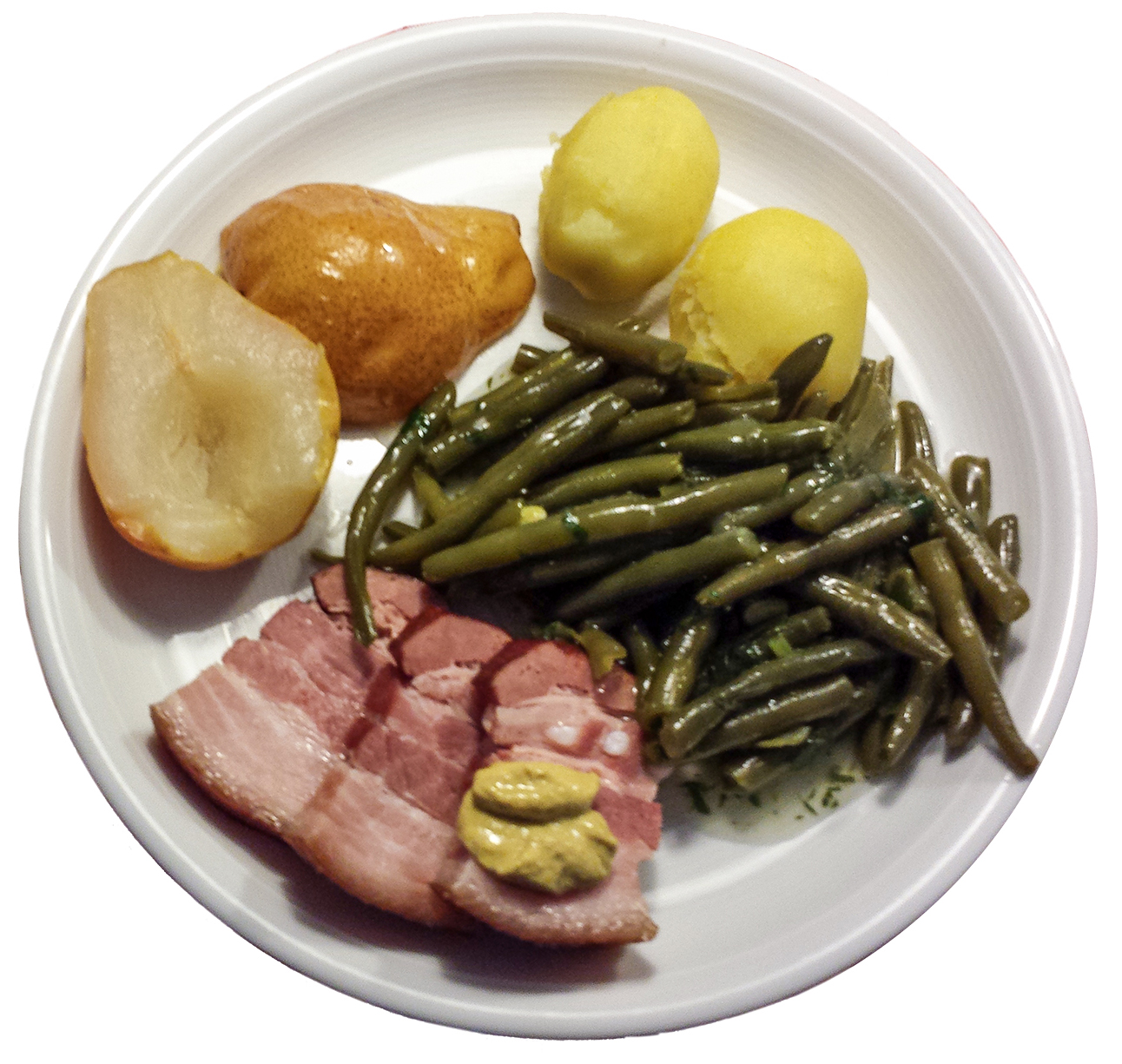 Birnen, Bohnen und Speck, ein Gericht der norddeutschen Küche